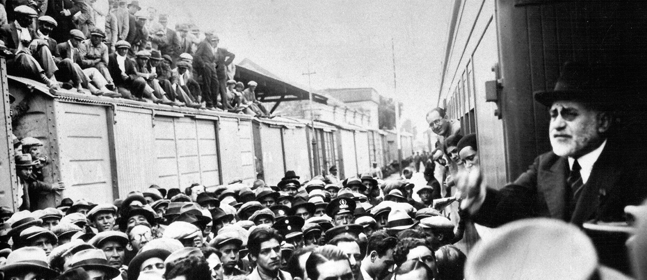 Lisandro de la Torre durante la campaña electoral del 1931.